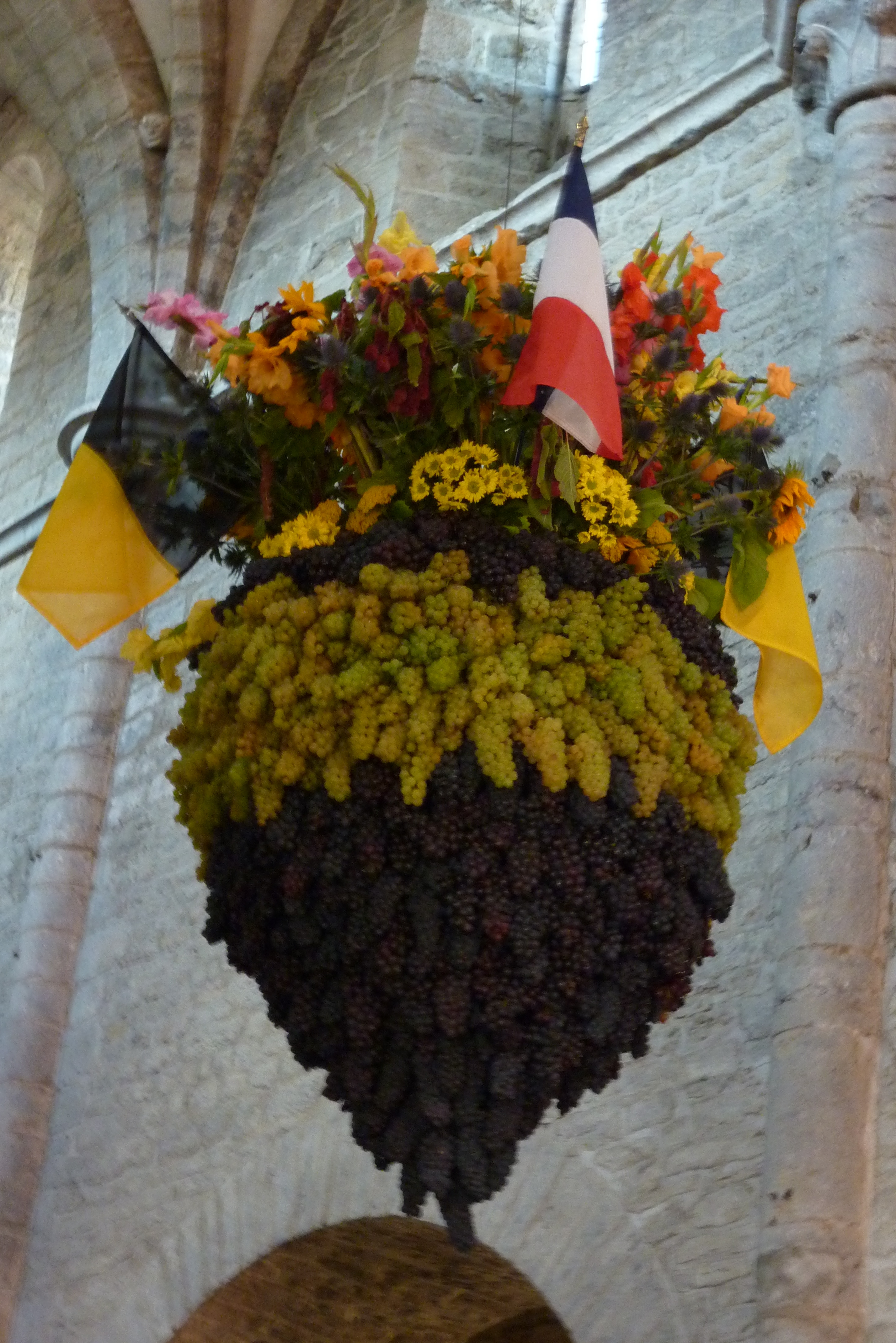 Biou in der Kirche Saint-Just in Arbois